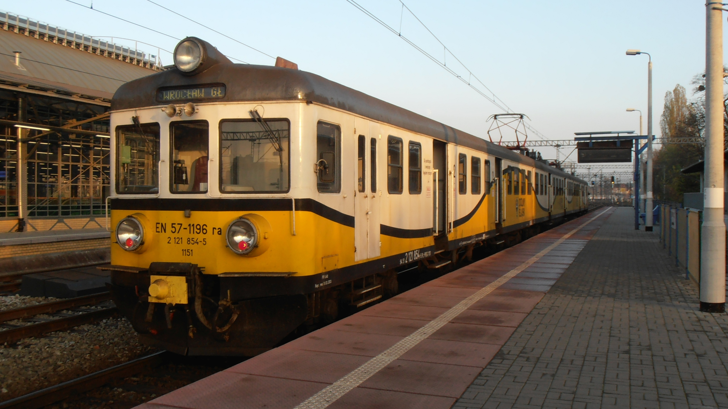 Wrocław Główny. EN57-1196 przy peronie 6.